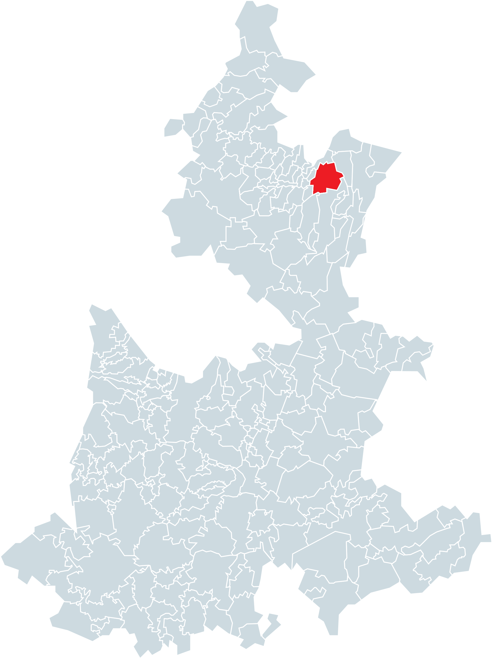 Municipio de Cuetzalan del Progreso